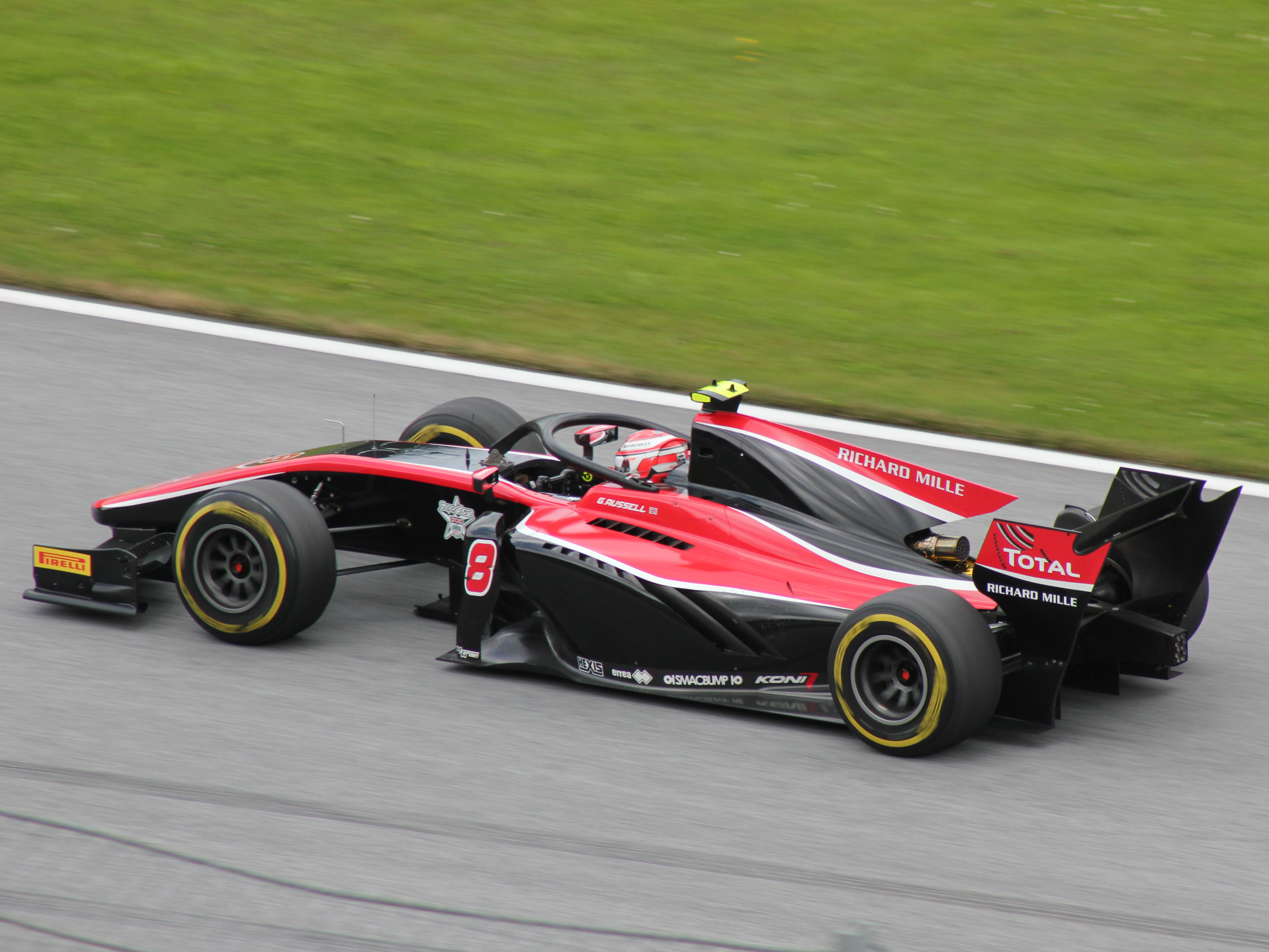 08 George Russell beim Rennwochenende in Österreich 2018 (3)